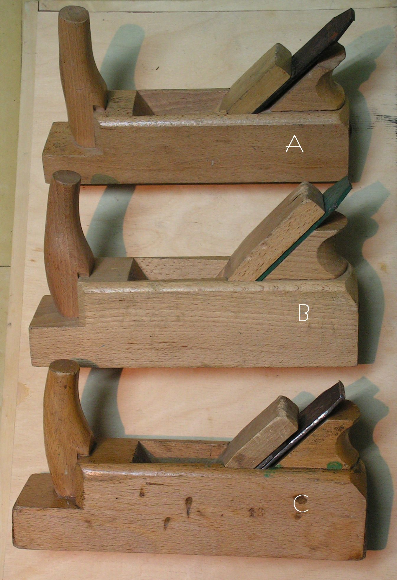 Trzy podstawowe rodzaje strugów. A - zdzierak, B - równiak, C - gładzik. Widok z góry.